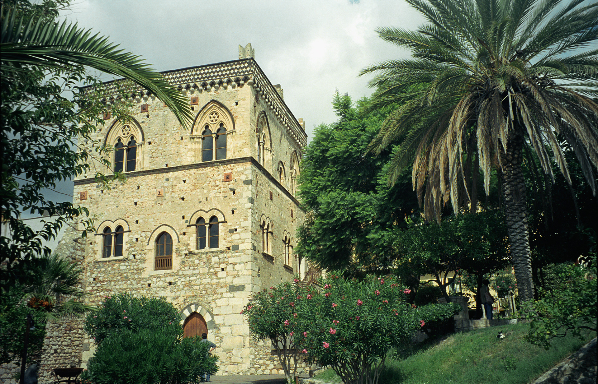 Palazzo Duchi di Santo Stefano a Taormina, Sicily.